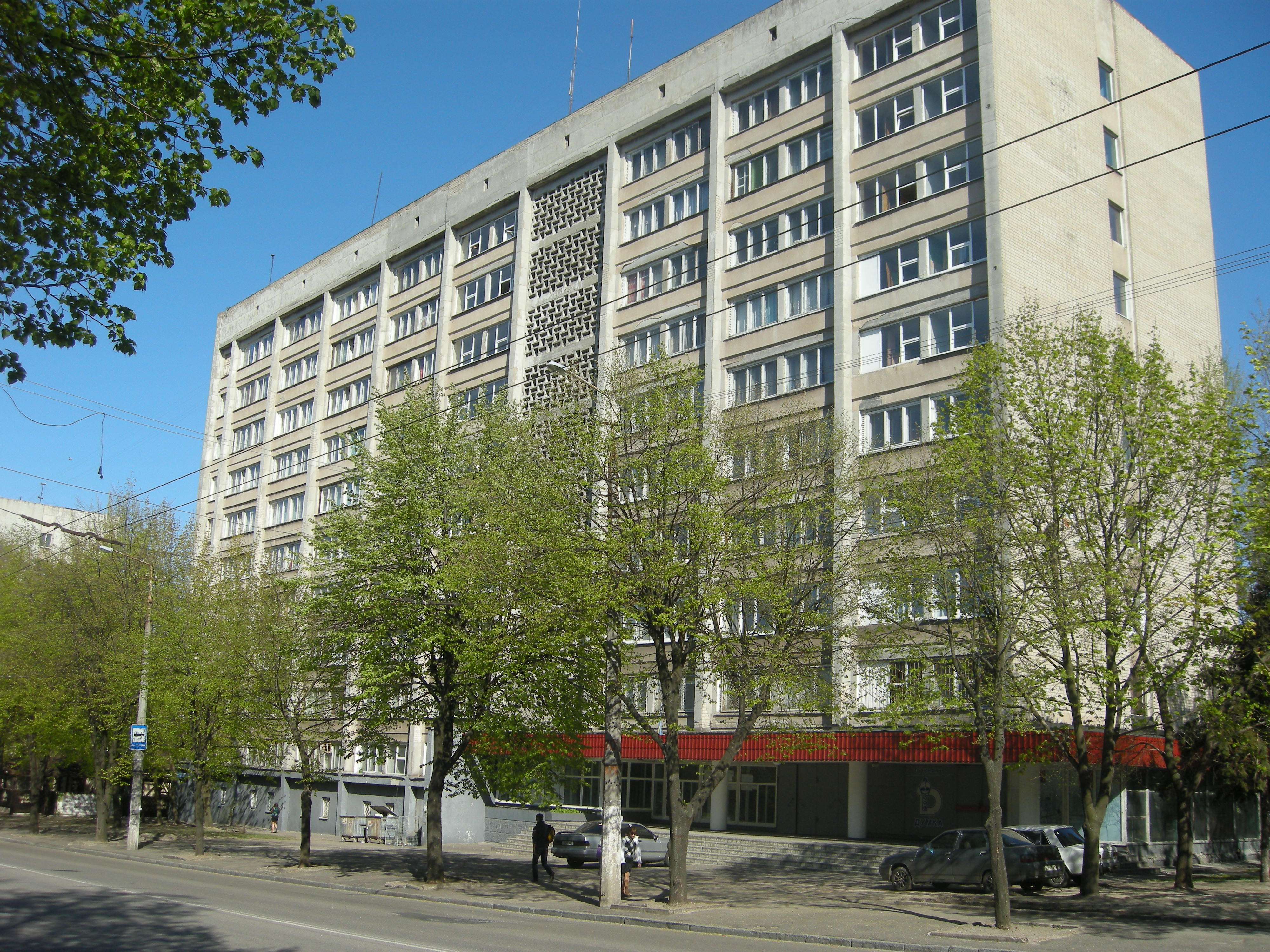 Общежитие № 3 "Национального горного университета" на проспекте Гагарина.